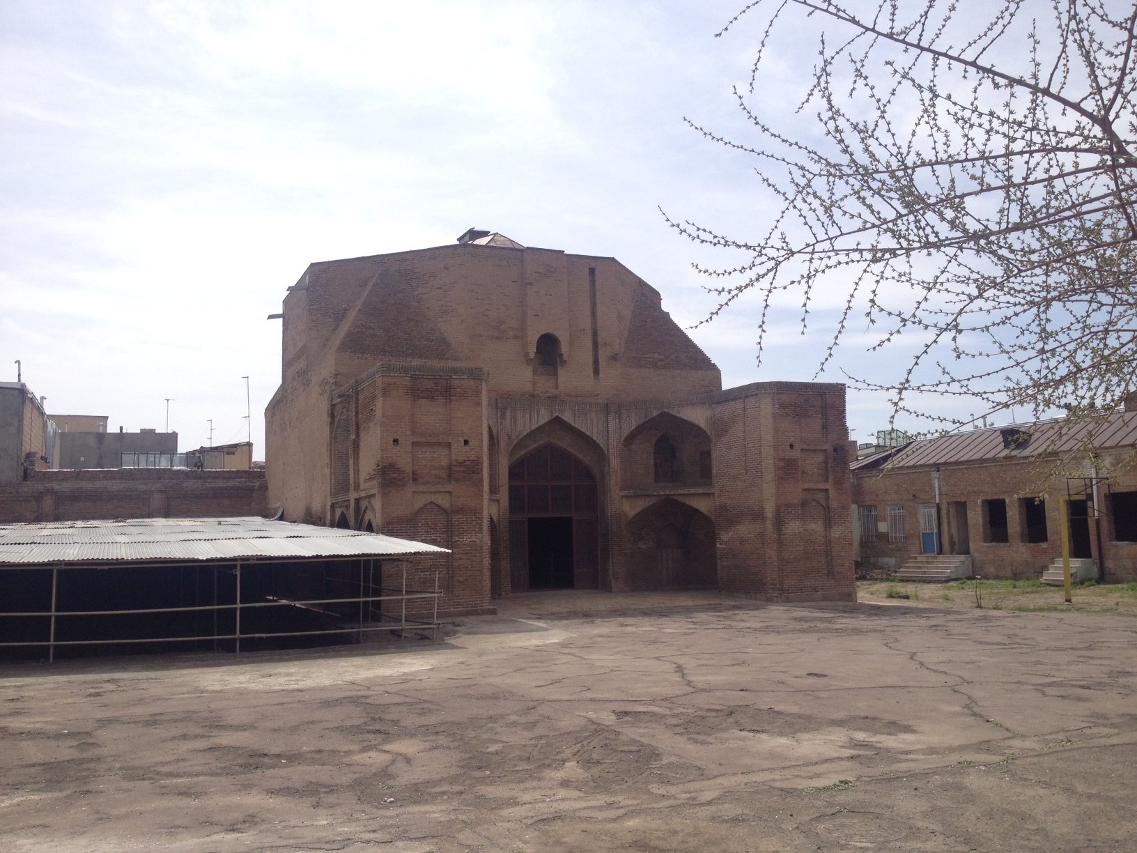 مدرسه حیدریه